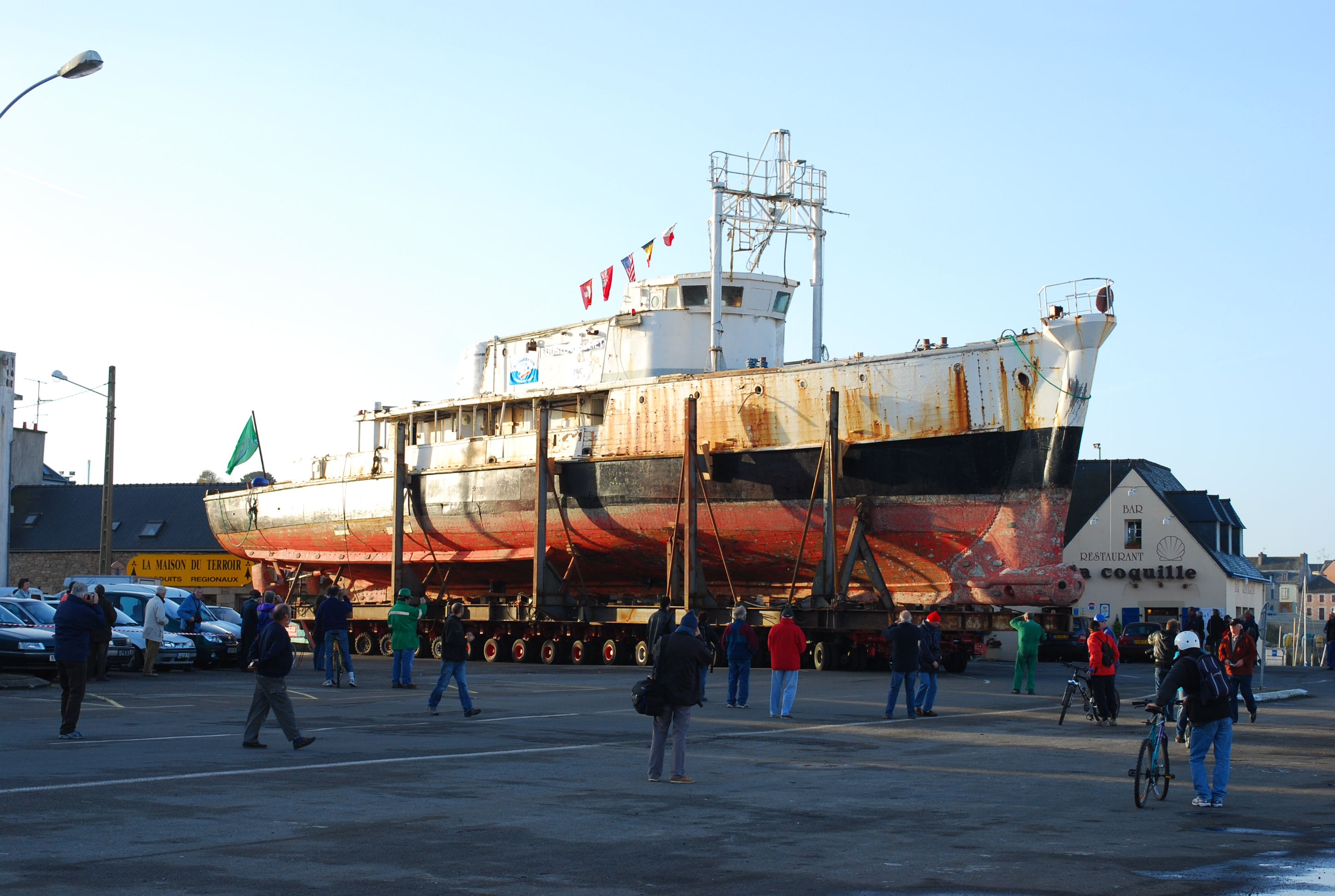 La Calypso transportée par route vers son chantier de rénovation.